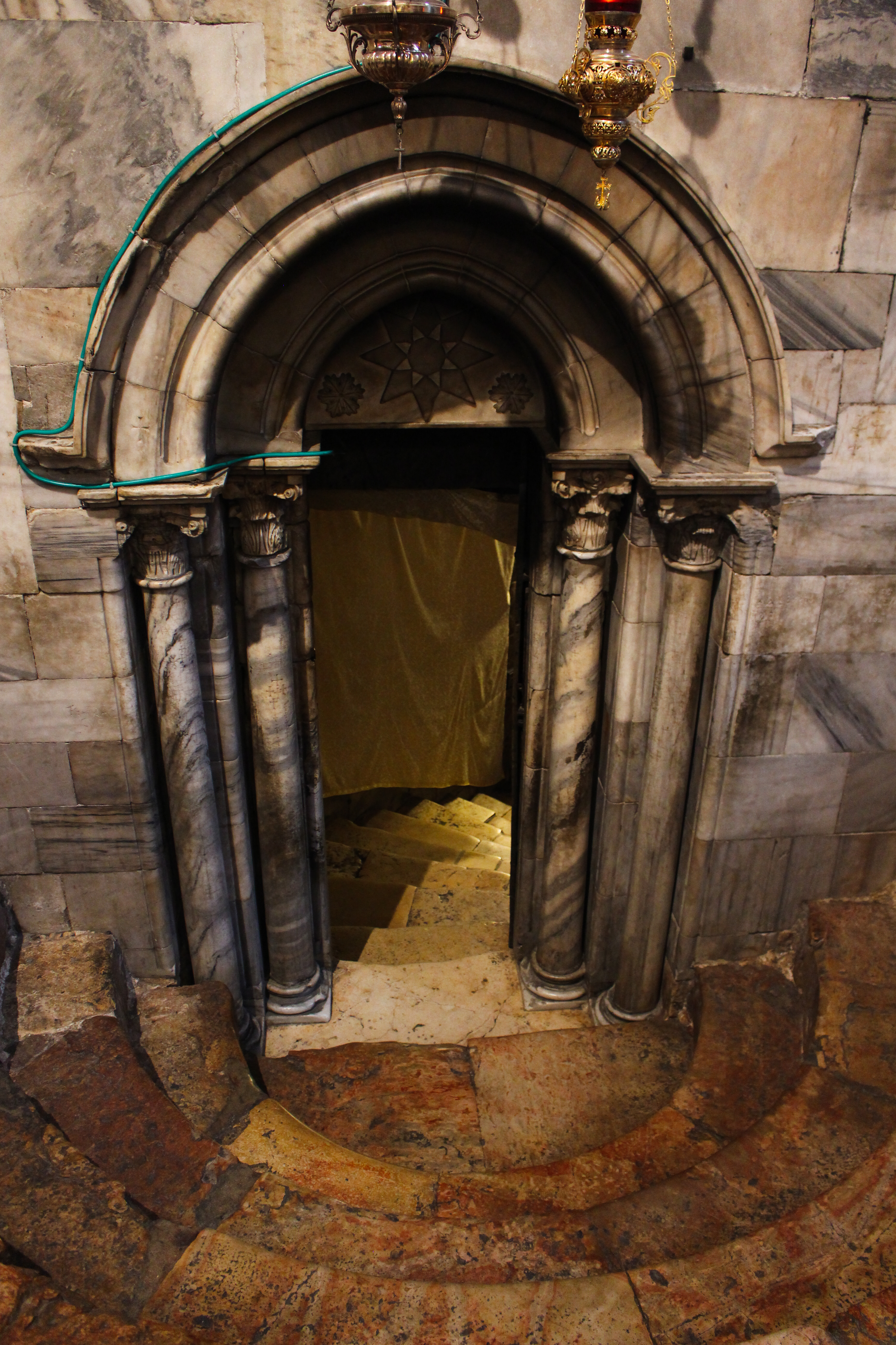 الباب والنفق المؤدي الى المغارة التي ولد فيها المسيح عليه السلام في كنيسة المهد بيت لحم فلسطين